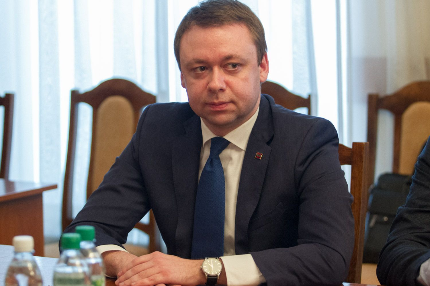 Александр Владимирович Мартынов - Председатель Правительства ПМР